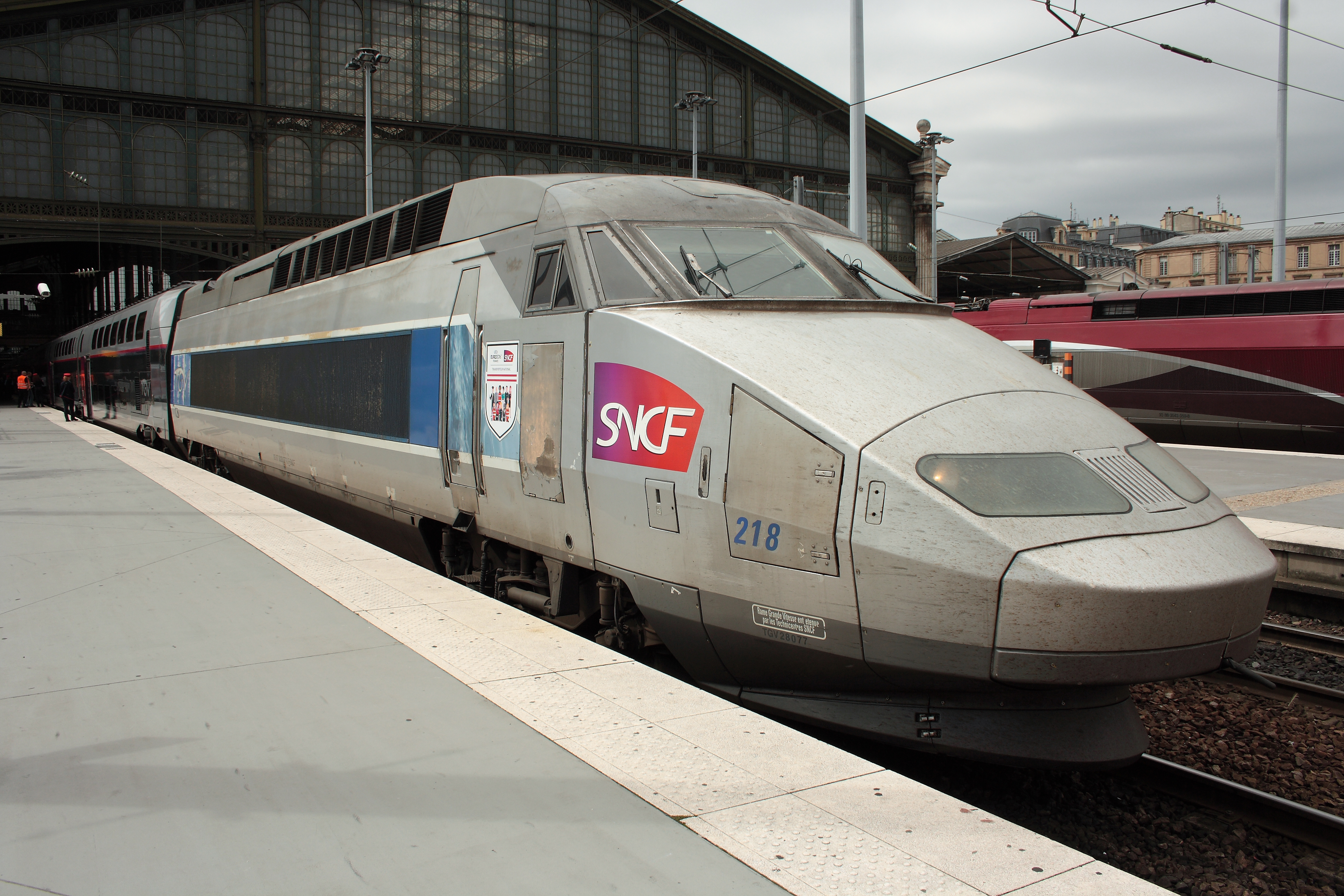 À la suite d'un accident sur sa motrice 29035 le 14 décembre 2015 près de Sélestat (67), la rame TGV Duplex n° 218 (en livrée Carmillon) a circulé avec la motrice 28077 (issue de l'ancienne rame Réseau bicourant n° 539 ; en livrée Lacroix), ce pendant plus de huit mois (en 2016).